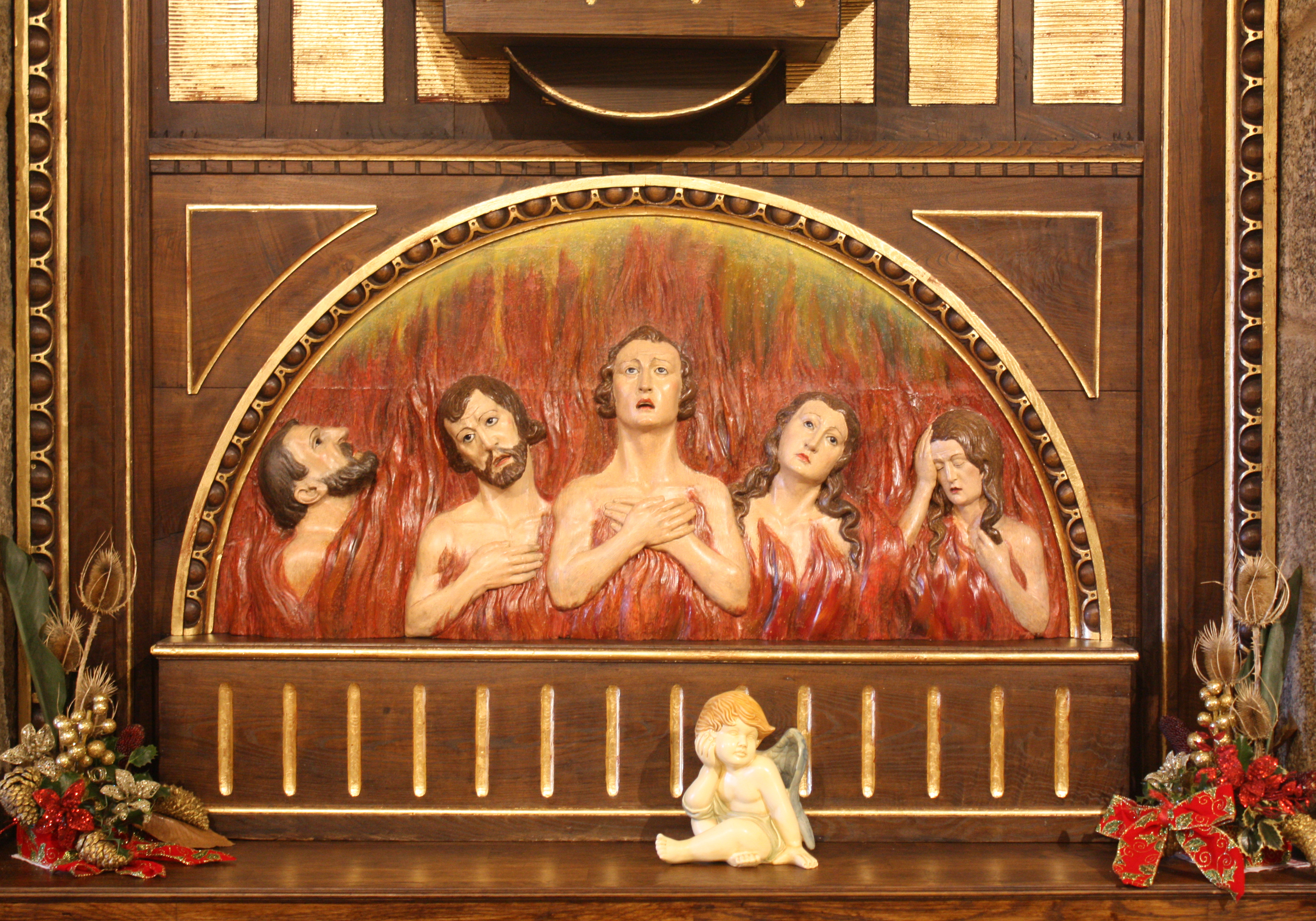 Relevo do Purgatorio na igrexa de San Vicente do Grove (O Grove, Pontevedra)